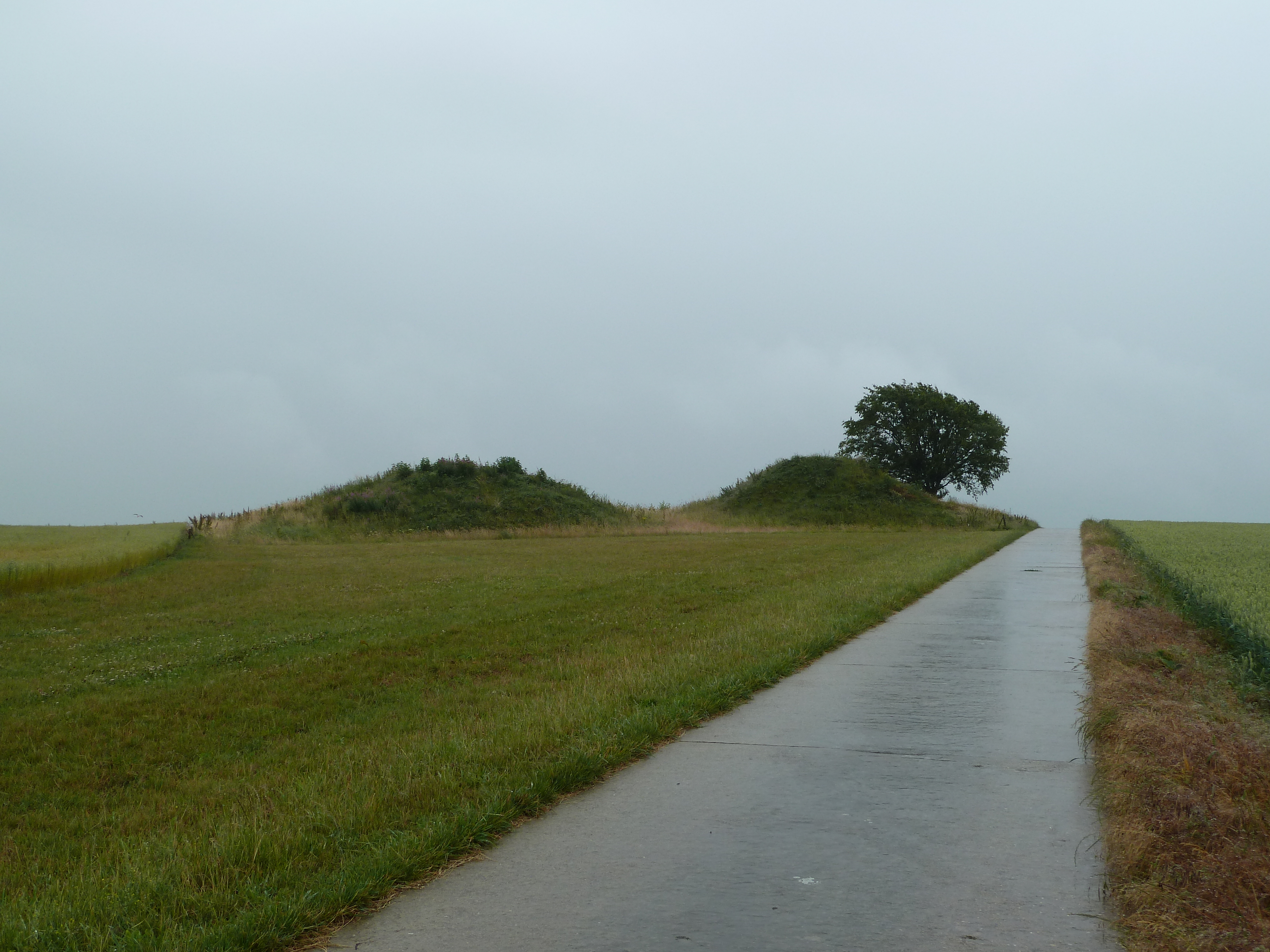 Les Deux Tombes, Gingelom, Belgique